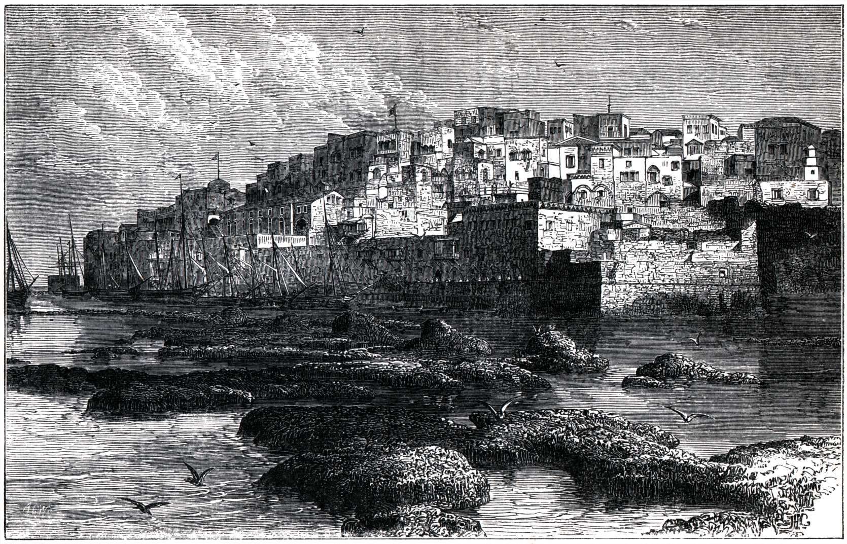 Jaffa